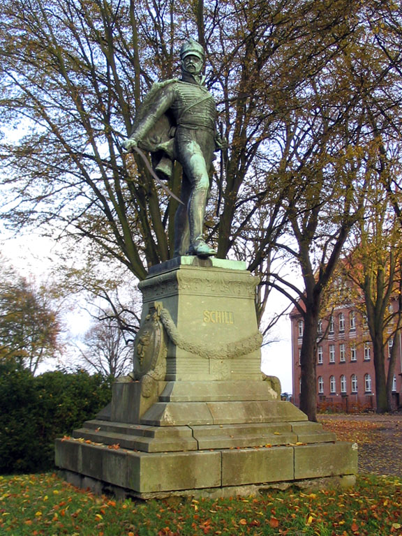 Beschreibung: Ferdinand von Schill Denkmal in Stralsund Fotograf: Darkone, 6. November 2003 other version